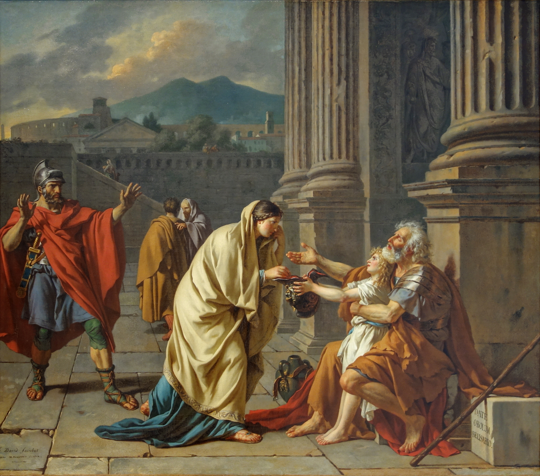 Bélisaire, général de l'empereur romain Justinien, réduit à la mendicité, reconnu par un de ses anciens officierstitle QS:P1476,fr:"Bélisaire, général de l'empereur romain Justinien, réduit à la mendicité, reconnu par un de ses anciens officiers" label QS:Lfr,"Bélisaire, général de l'empereur romain Justinien, réduit à la mendicité, reconnu par un de ses anciens officiers"